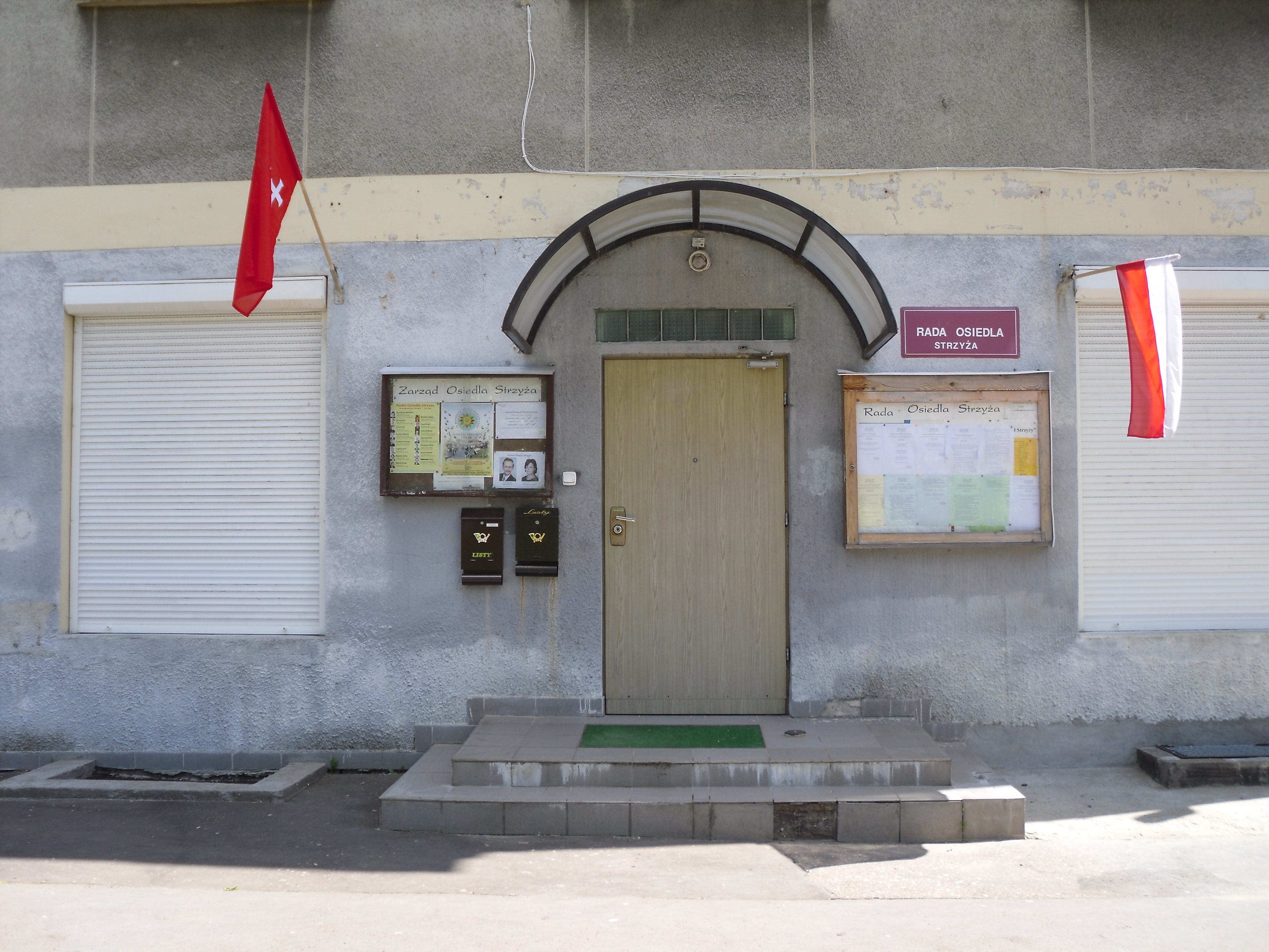 Budynek Rady Osiedla Strzyża